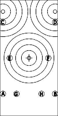 stocksport zielbewerb spielfeld